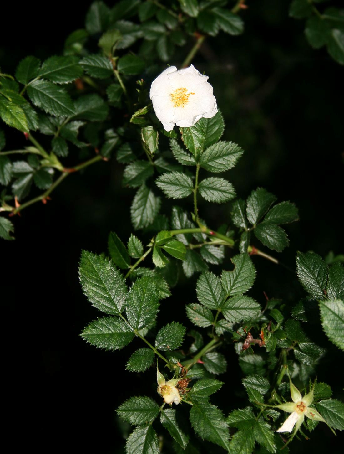 Kleinblütige Rose (Rosa micrantha), Rosengewächse (Rosaceae) - Slowenien/Slovenija/Slovenia: Primorska, N Podgorje